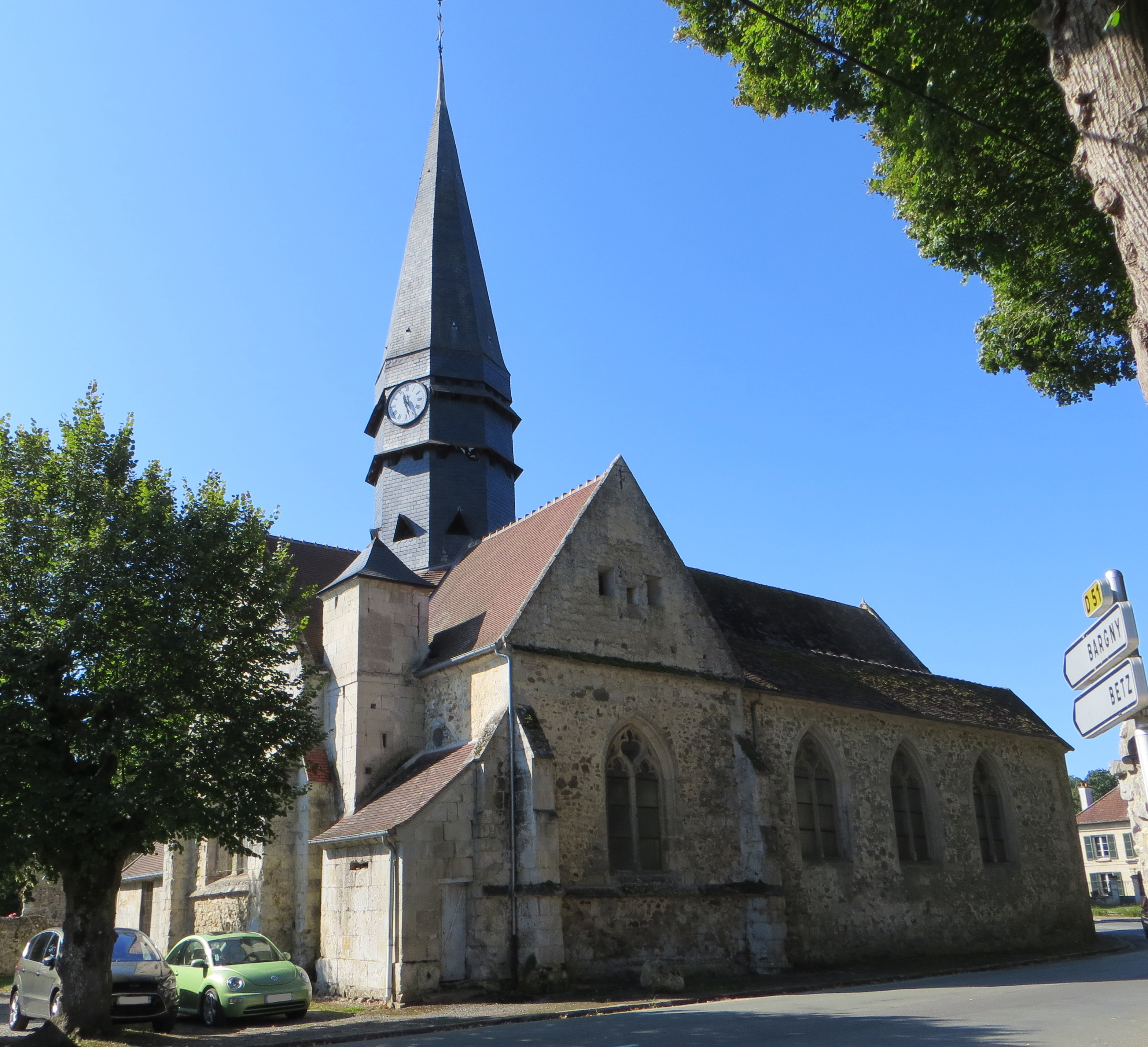 Vue générale de l'église